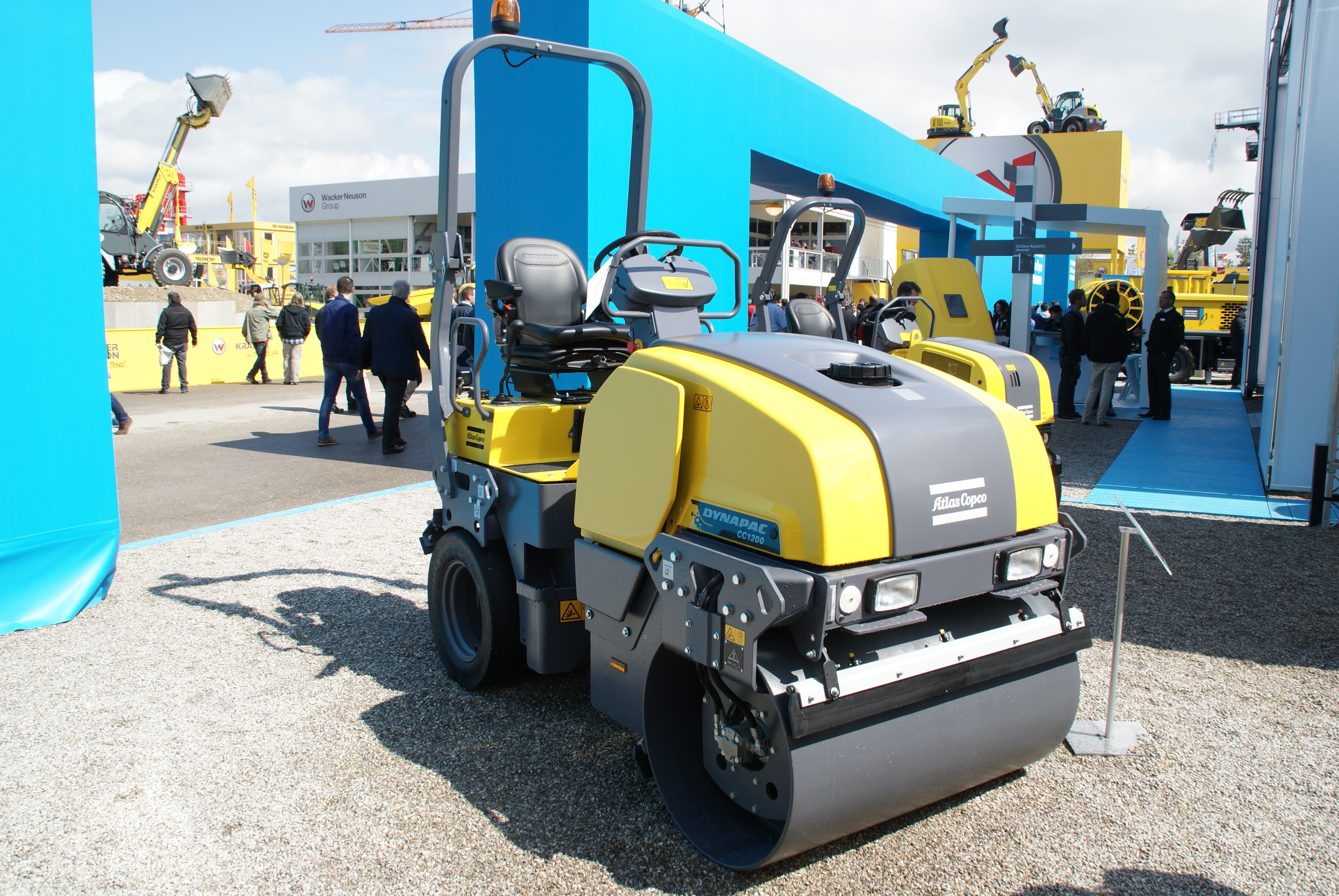 Kombiwalze der Fa. Atlas Copco